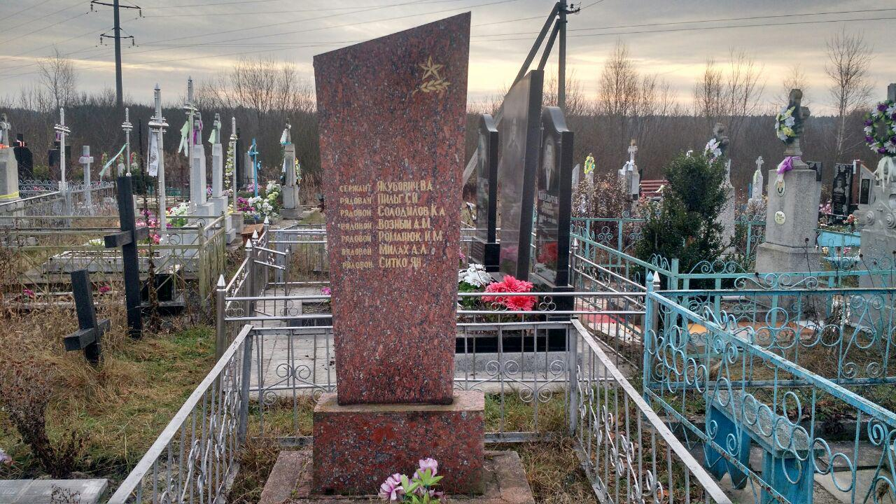 Могила братська радянських воїнів, Озеро, на кладовищі